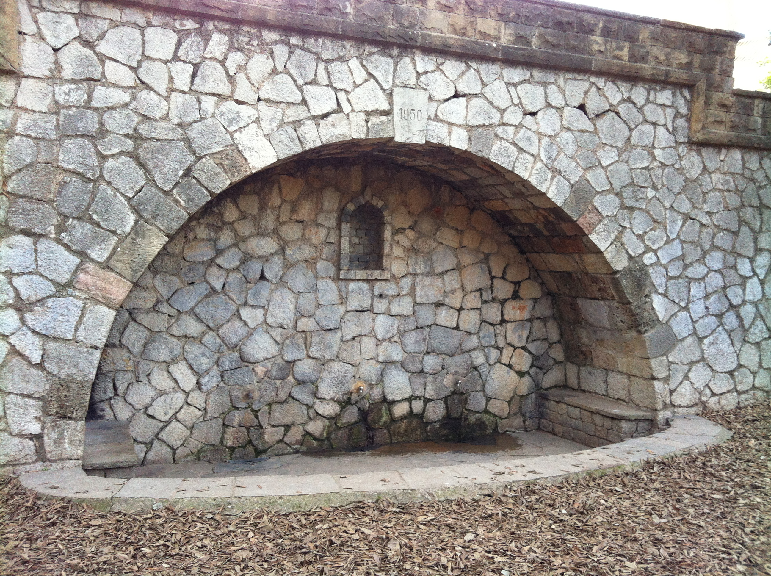 Font del Santuari de la Salut de Sabadell